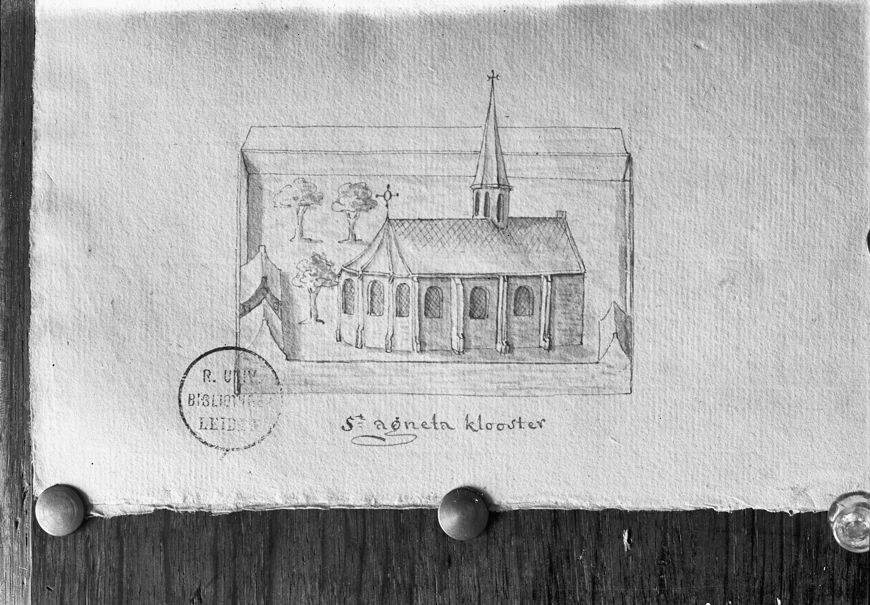 Prinsenhof: Tekening van het Sint Agnetaklooster (opmerking: Tekening van Mr. W. v.d. Lely in de verzameling Bodel Nyenhuis te Leiden)